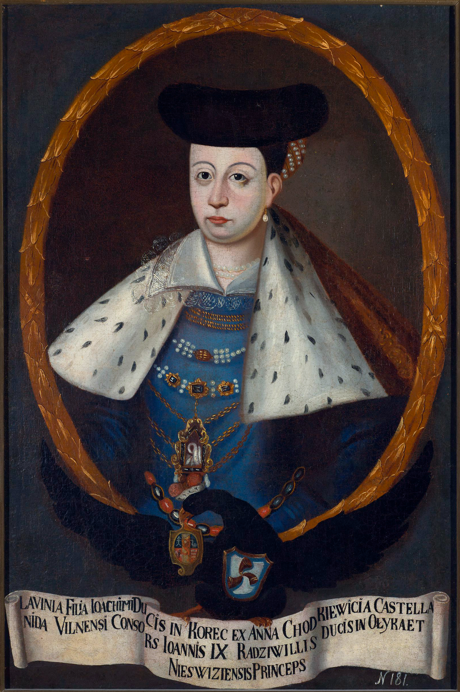 Беларуская (тарашкевіца): Партрэт Лявініі Радзівіл (Lavinija Radzivił) з роду Карэцкіх (Karecki)